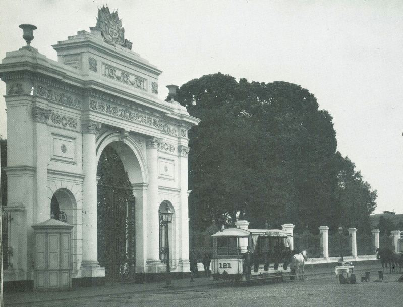 Tranvia de Sangre frente al Parque de la Exposición de la Ciudad de Lima - Perú.